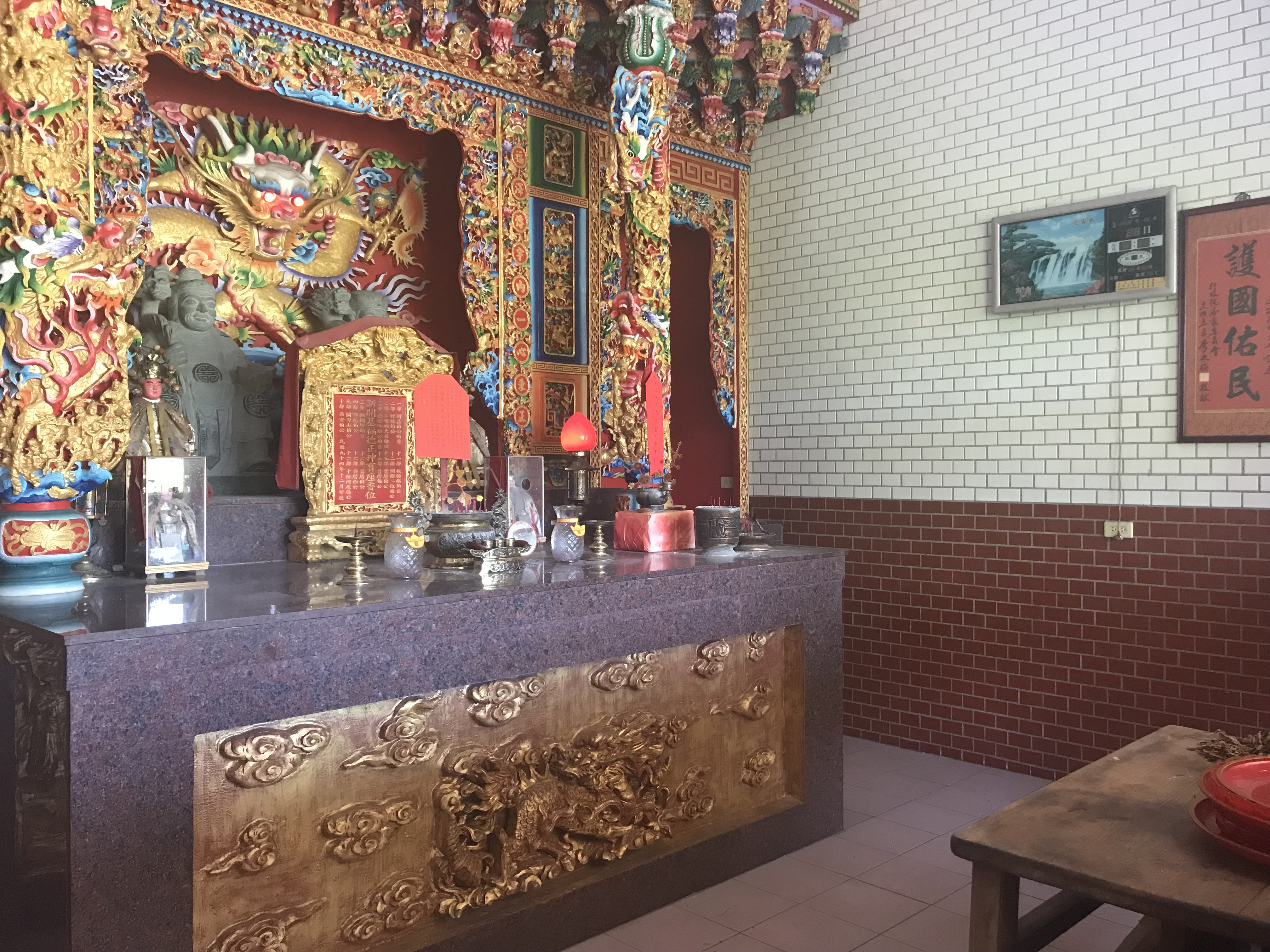 新開福德祠神像與牌位